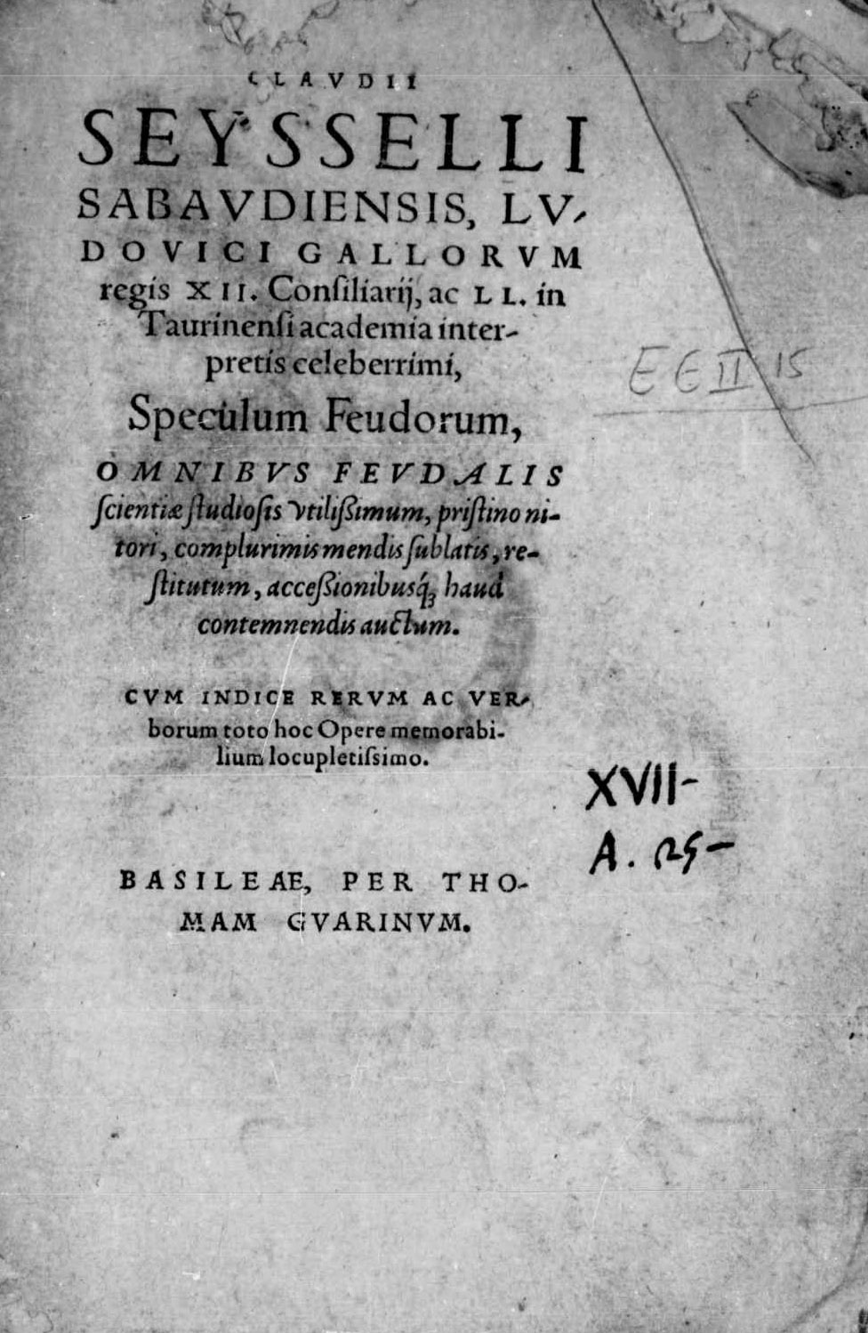 Frontespizio